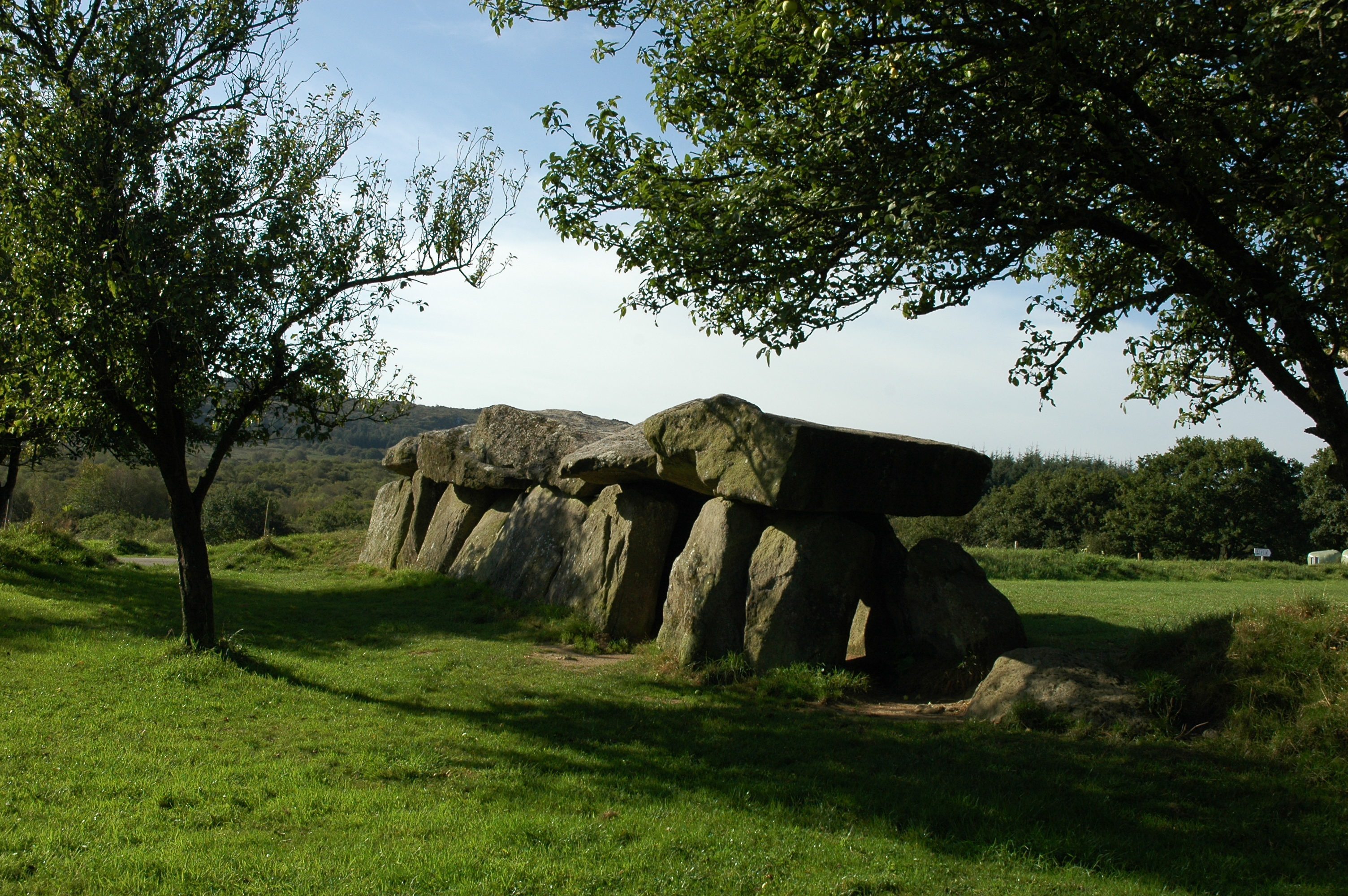 Allée Couverte du Mougau-Bihan à Commana, Finistère, France